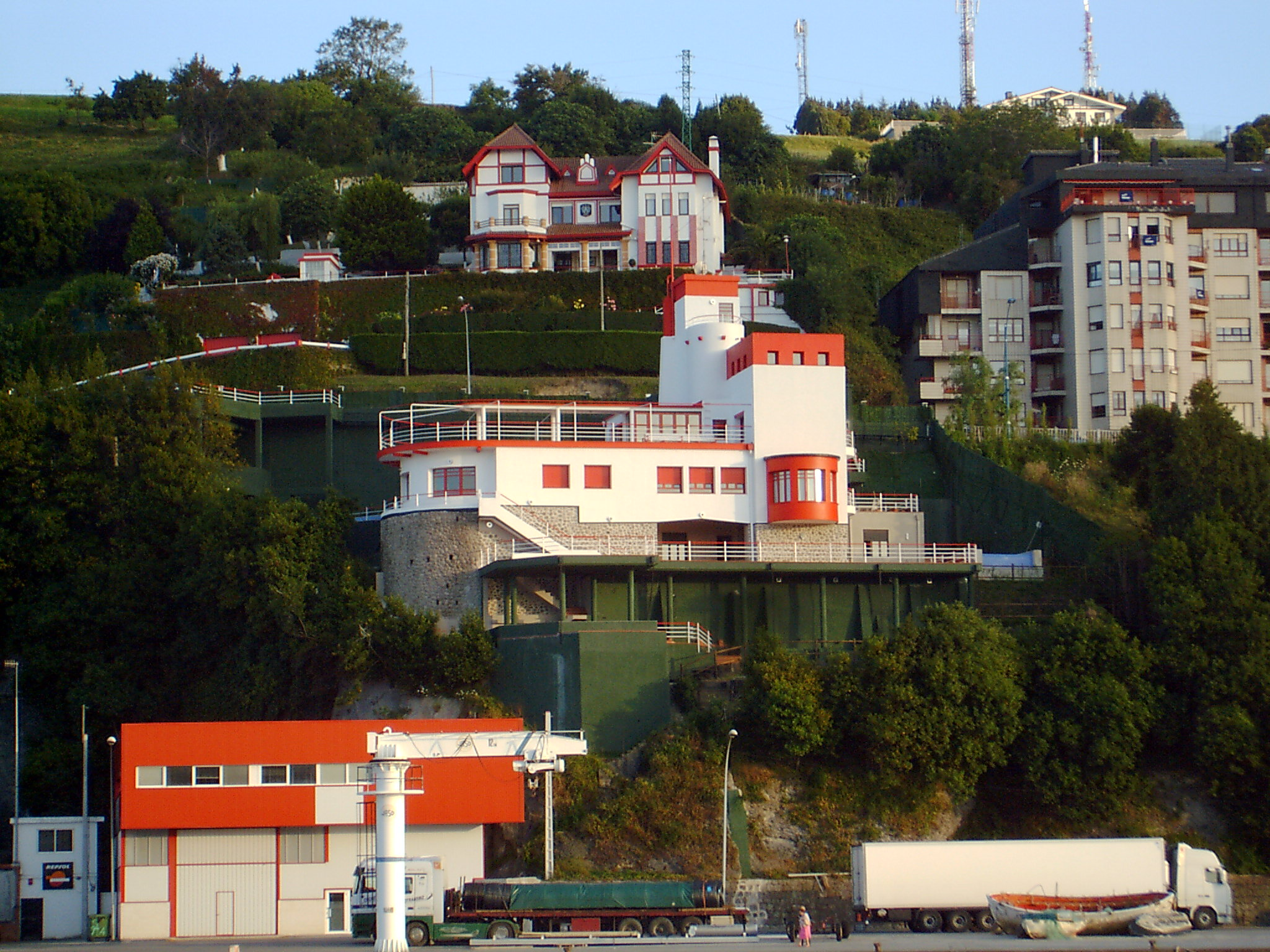 Bermeo kinkunbera house